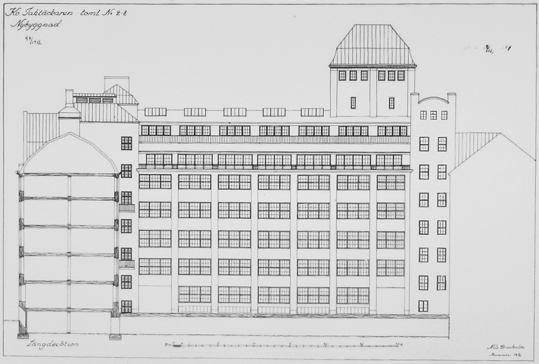 Kvarteret Taktäckaren ritning, sektion, gården